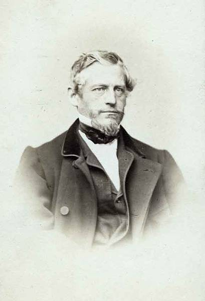 Josef Mayburger im Alter von 51 Jahren Salzburg Museum, Inv.-Nr. 19824